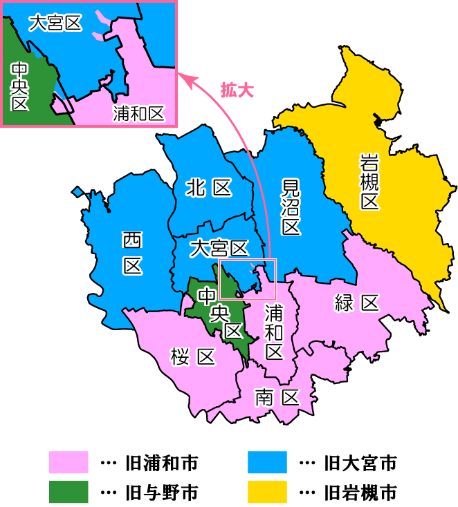 さいたま市の区と市町村合併前の市域との対応関係を示した図。